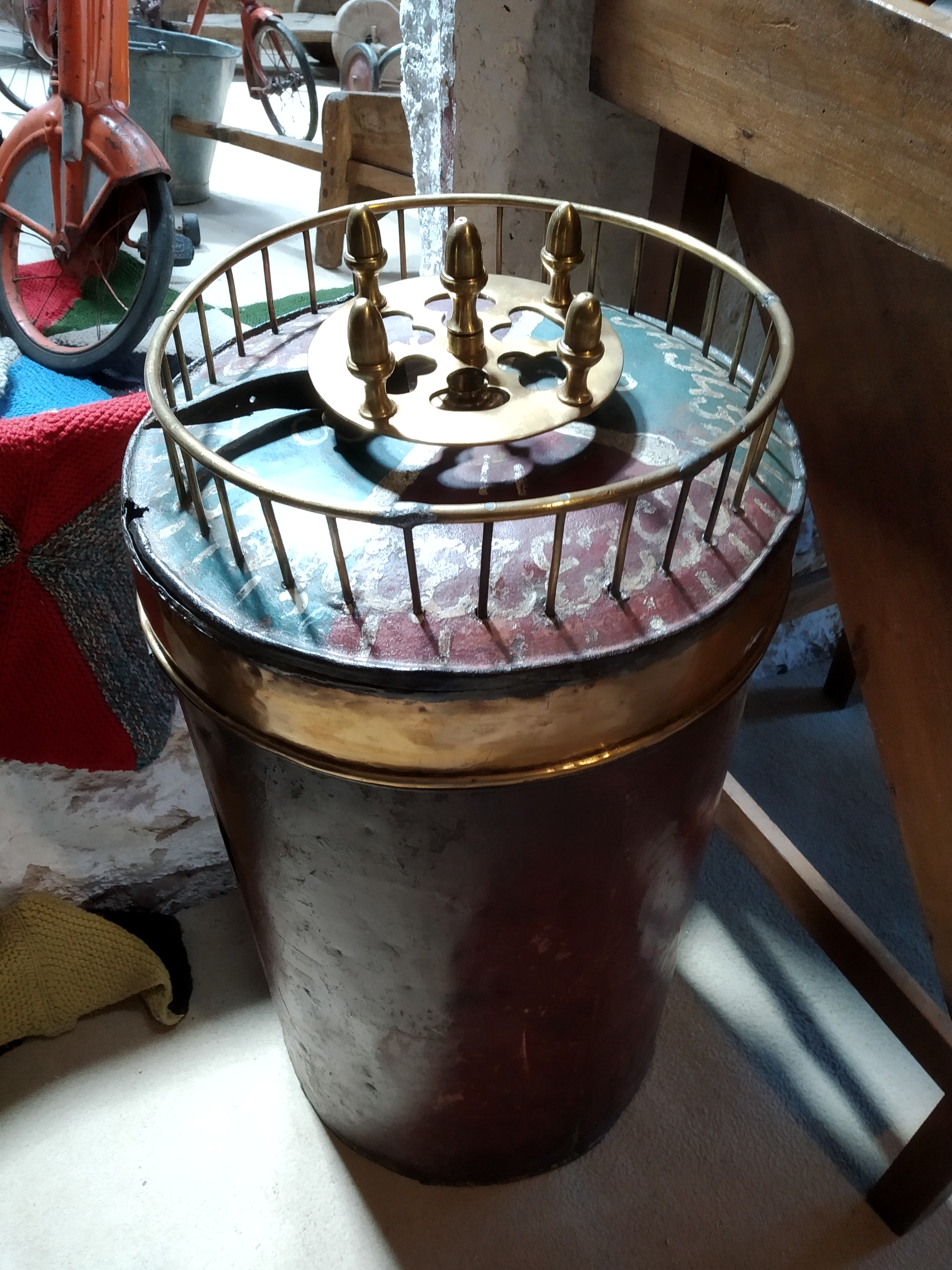 Barquillero con ruleta